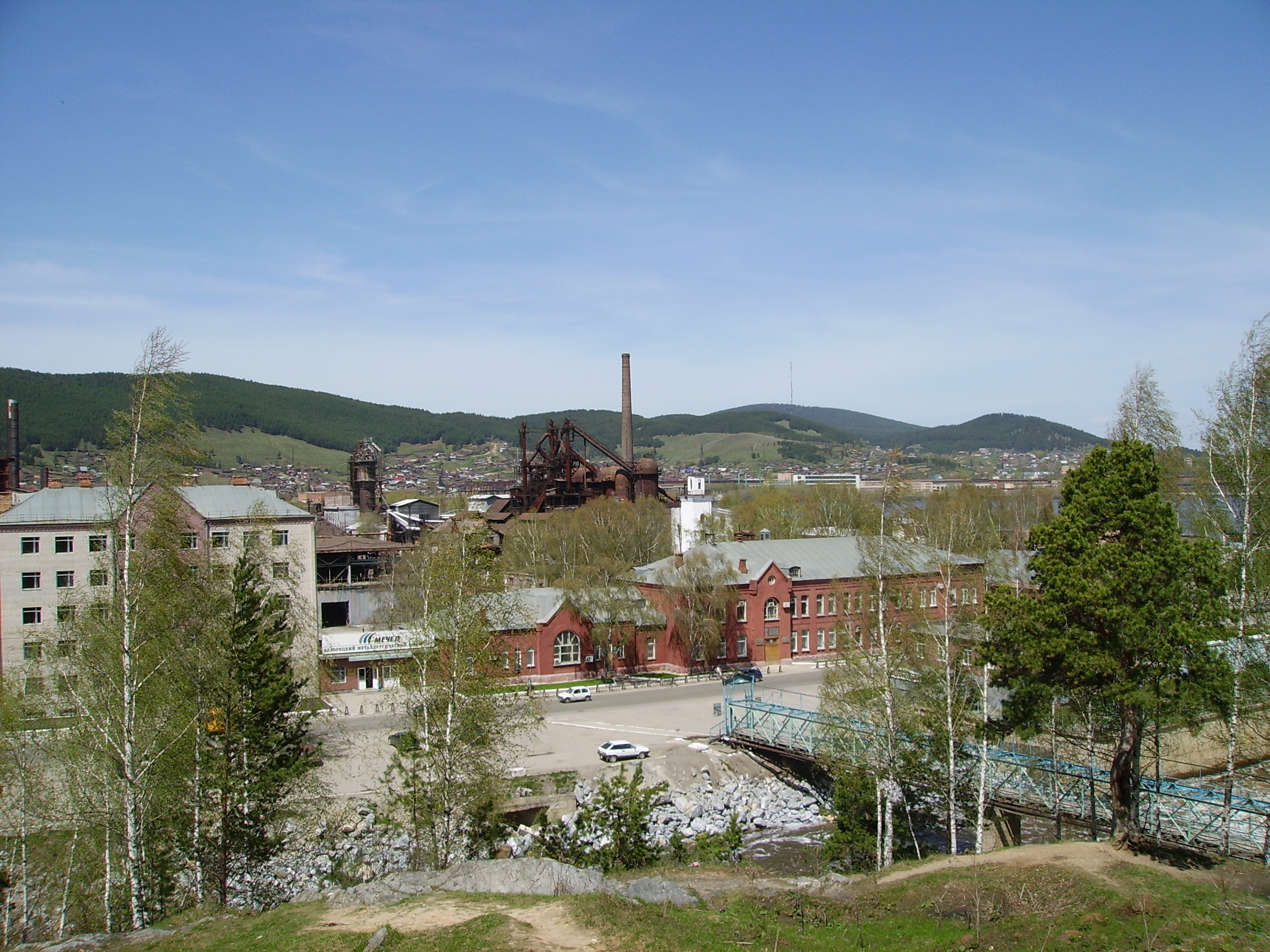 здание заводоуправления (Республика Башкортостан, Белорецк, металлургический комбинат)